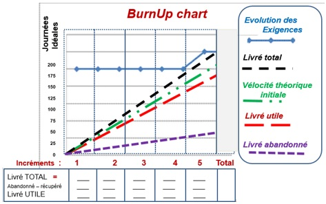 Première formalisation d'une métrique formelle Agile permettant la mise en oeuvre controlée des principes itératif et adaptatif.